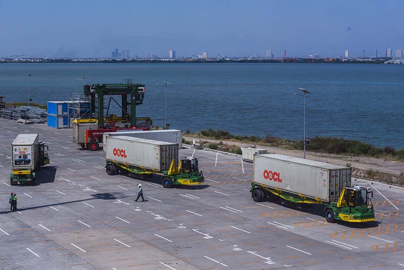 KARURU ZABUR ANTARA NEWS 5 TTL